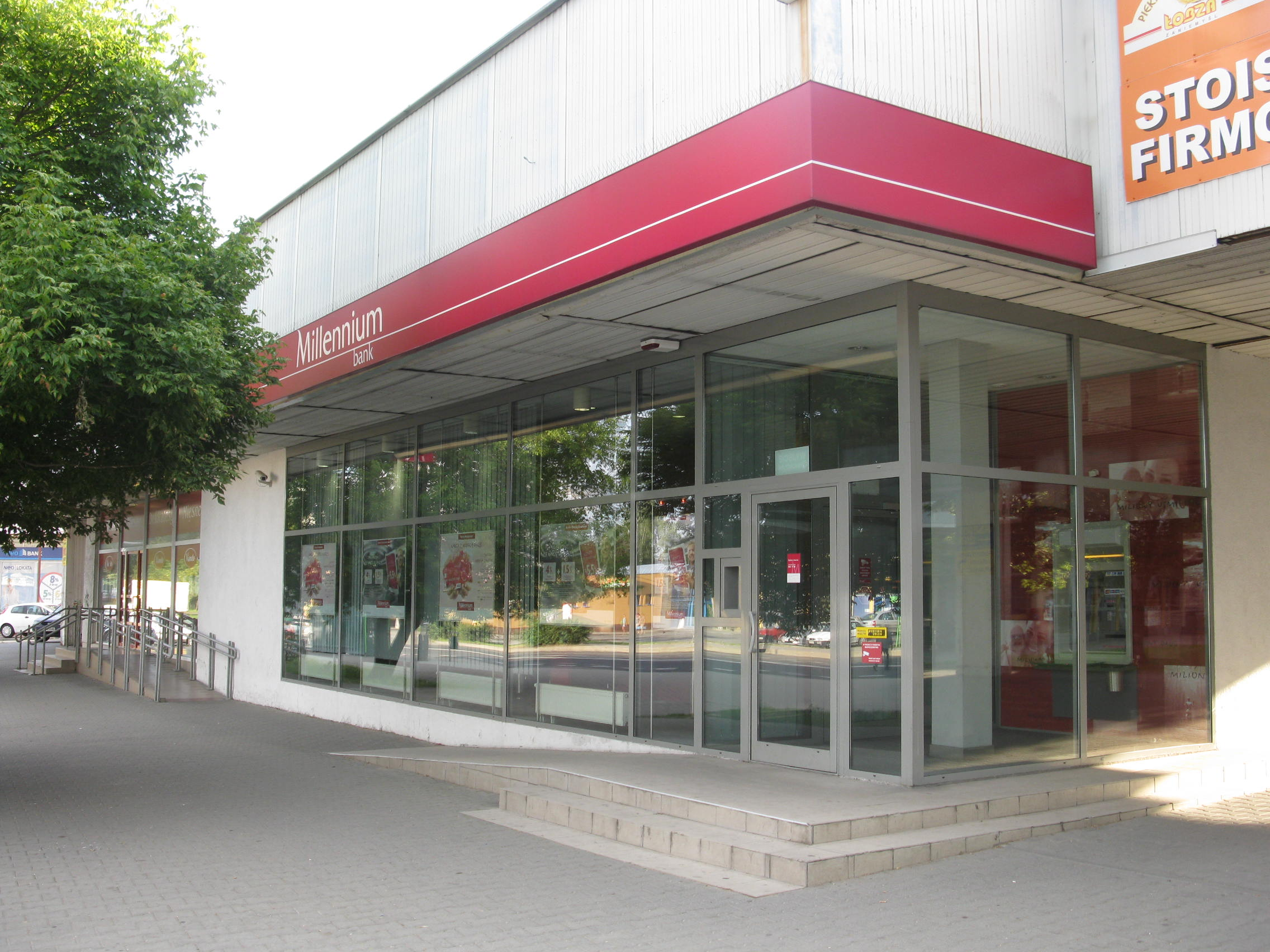 Bank Millennium w Poznaniu na os. Wichrowe Wzgórze